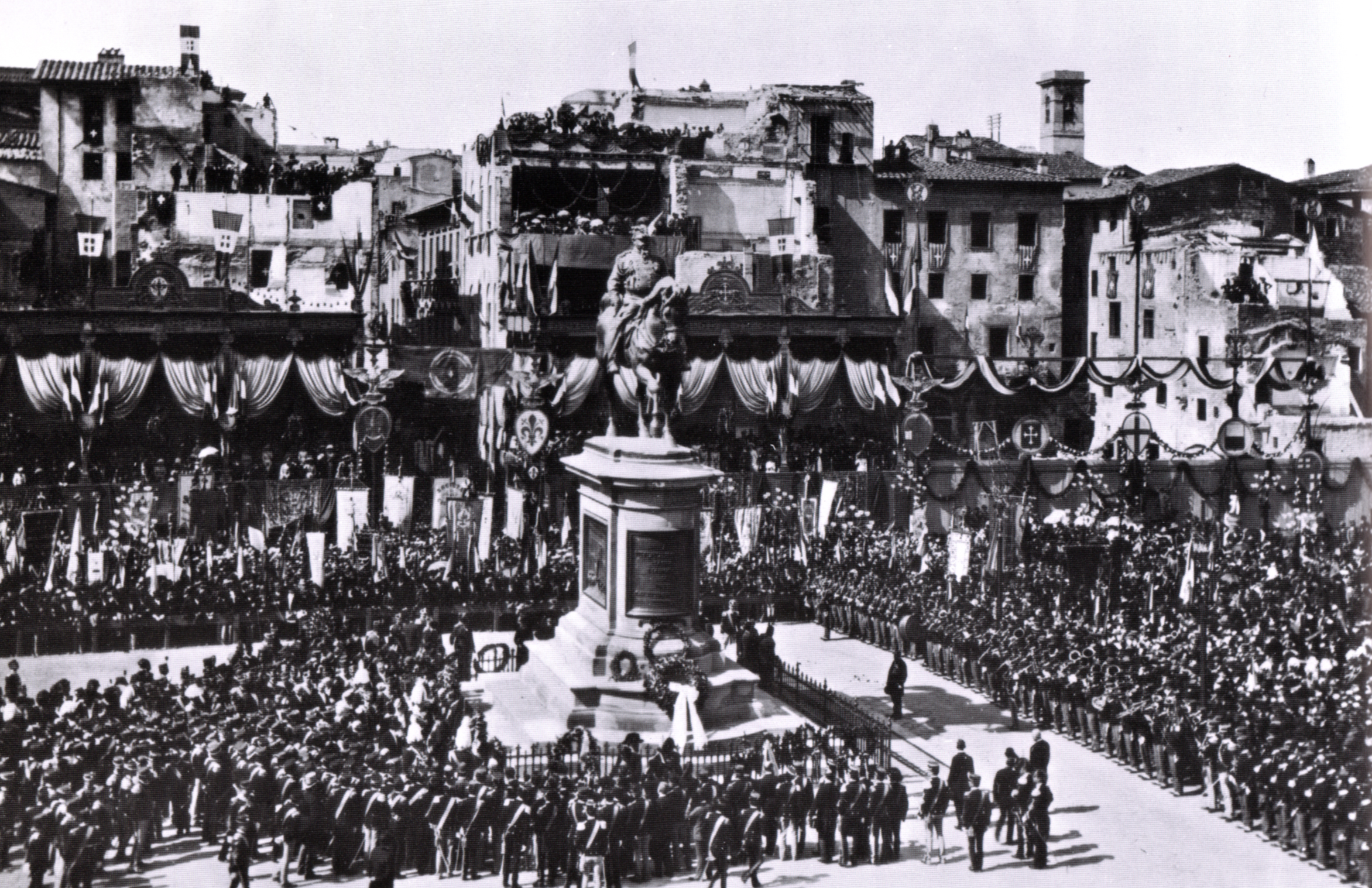 Piazza della repubblica in sept 20 1890